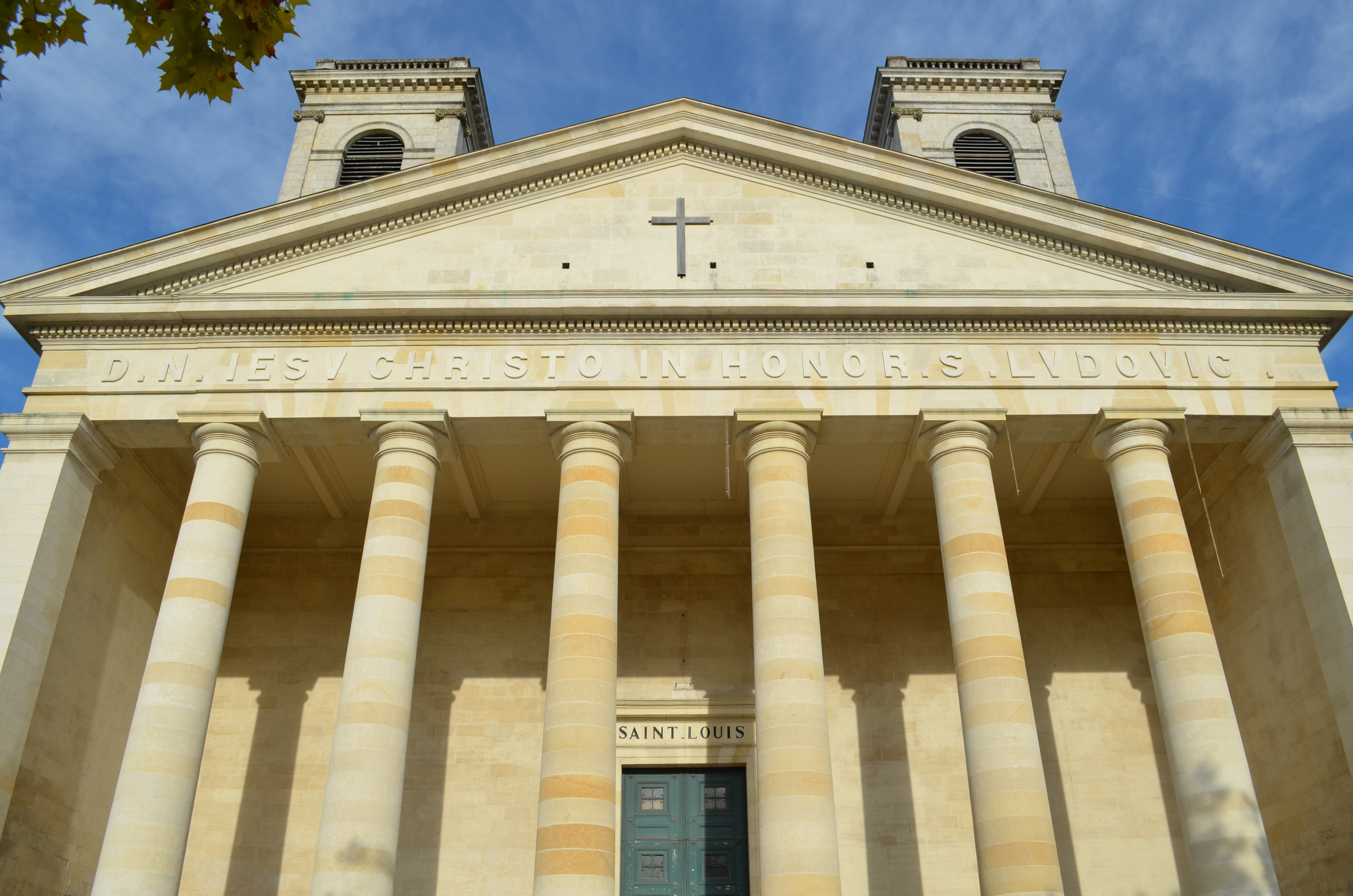 Église Saint-Louis, construite entre 1813 et 1830 - La Roche-sur-Yon .